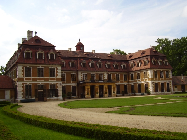 Pohled na hlavní budovu zámku Rájec nad Svitavou z nádvoří.